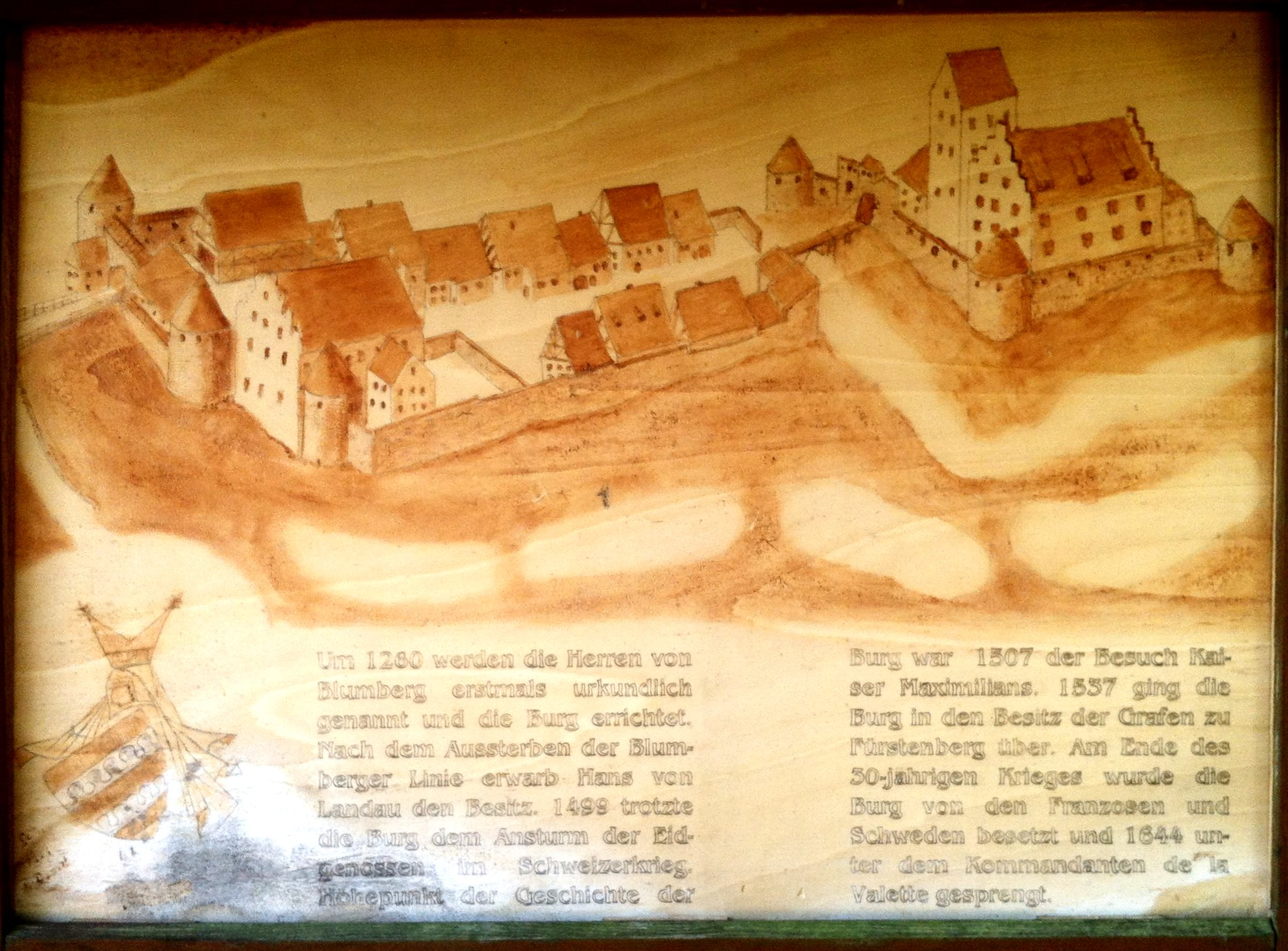 Blumberg, Stadt im Schwarzwald-Baar-Kreis. Infotafel auf dem Gelände der ehemaligen Anlage: Burg mit der sich direkt anschließenden, durch einen Halsgraben getrennten Vorburg, aus der sich die mittelalterliche Stadt entwickelte. Weiter links lag das damalige Straßendorf Blumberg (heute Stadtzentrum).